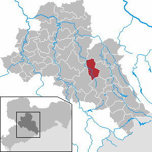 Oberschöna in Saxony - district Mittelsachsen